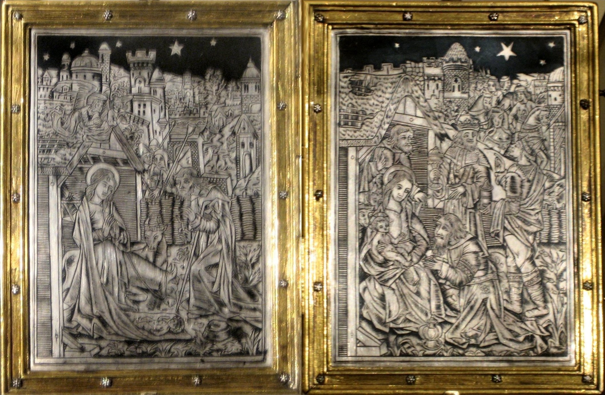 Diptych